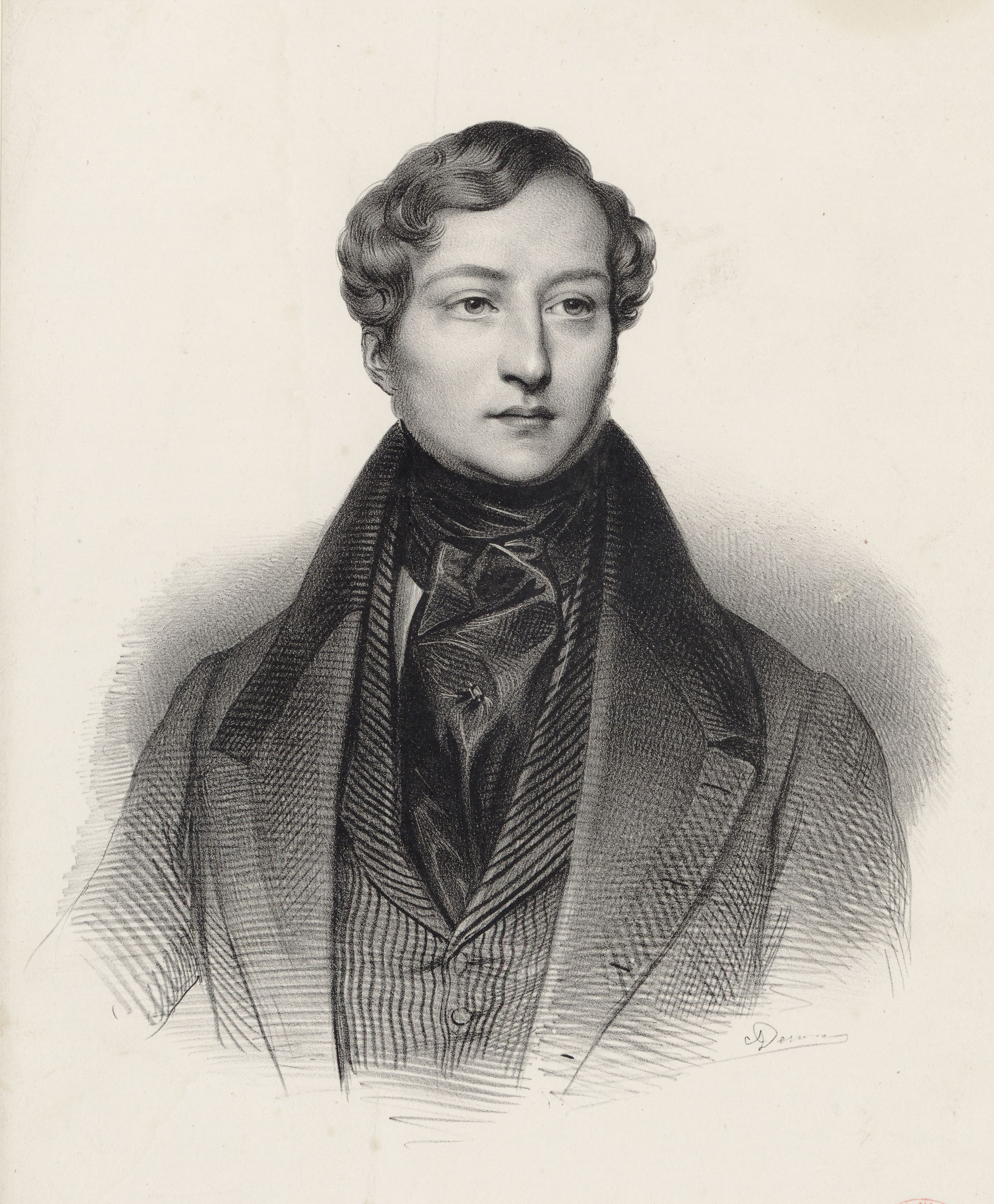 Portrait de Sigismund Thalberg à 24 ans, lithographie, 1836